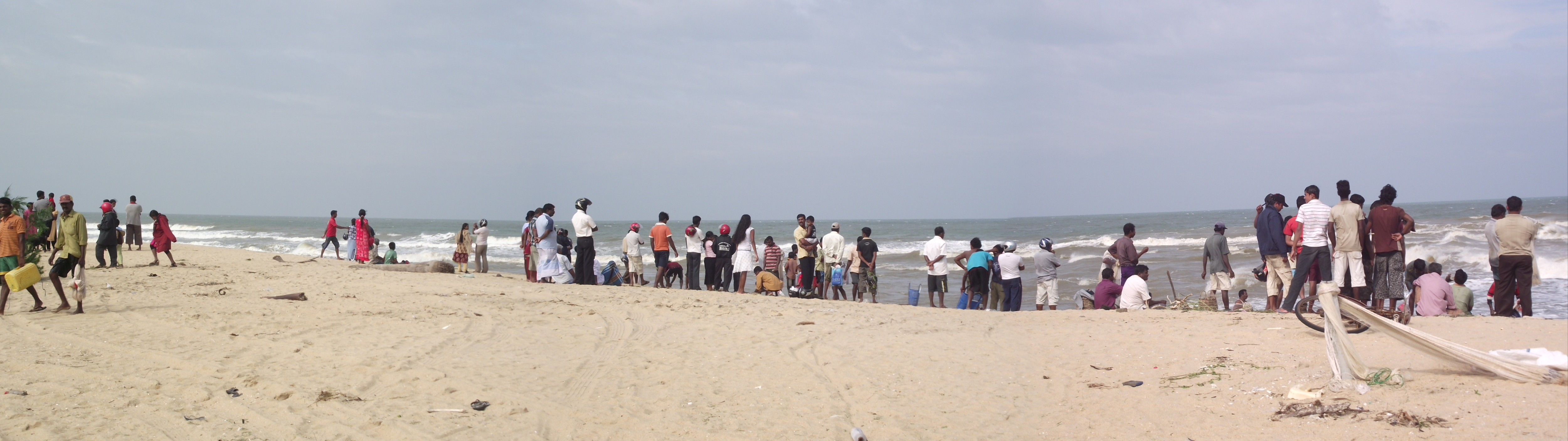 கல்லடி கடற்கரையின் பரந்த காட்சி.